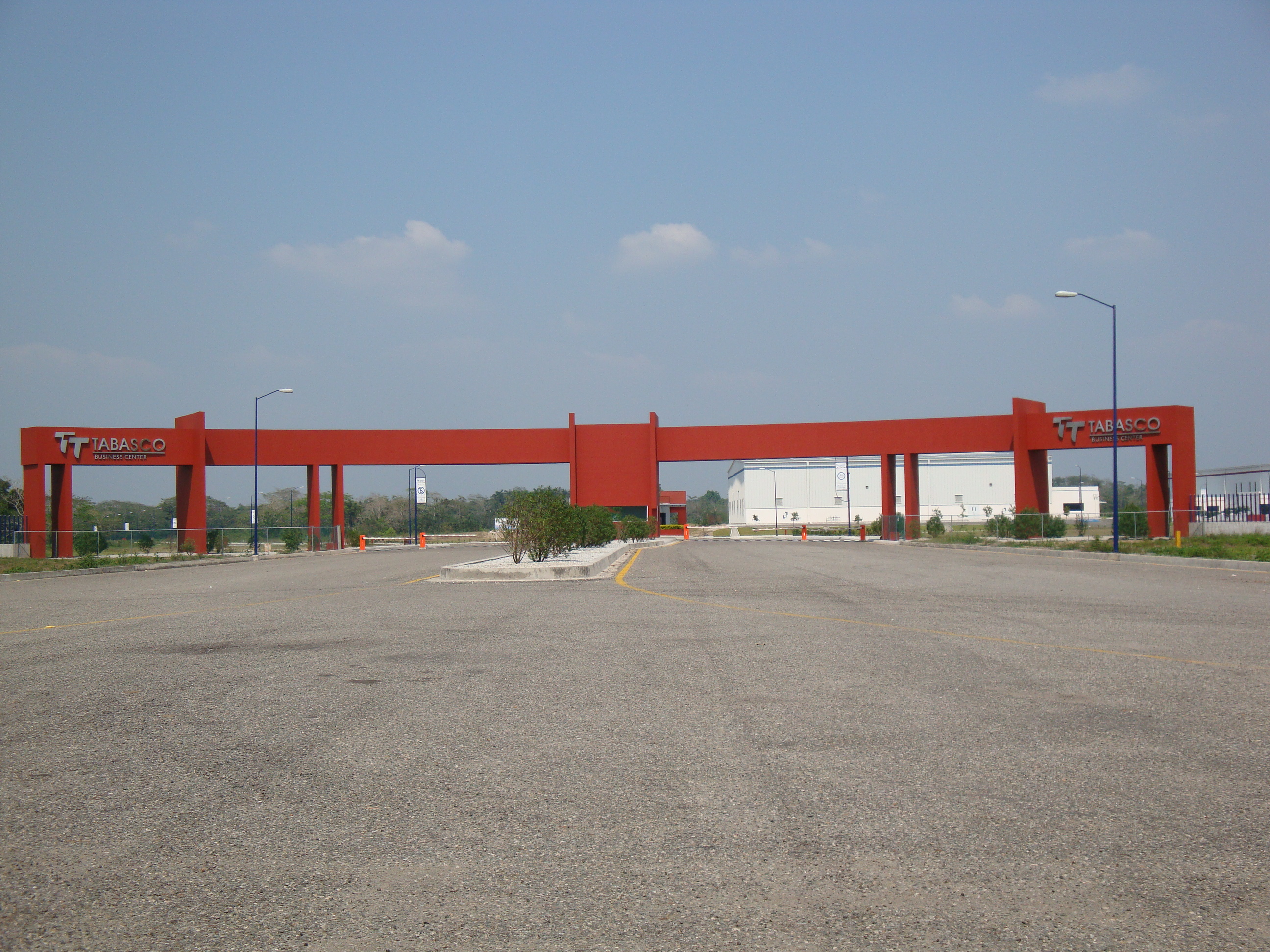 Entrada del parque industrial "Tabasco Business Center", en la ciudad de Cunduacán, Tabasco.